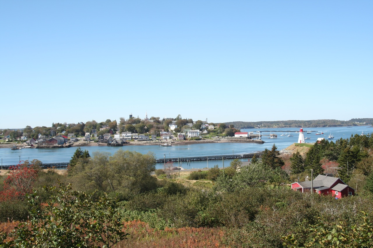 Blick auf Lubec